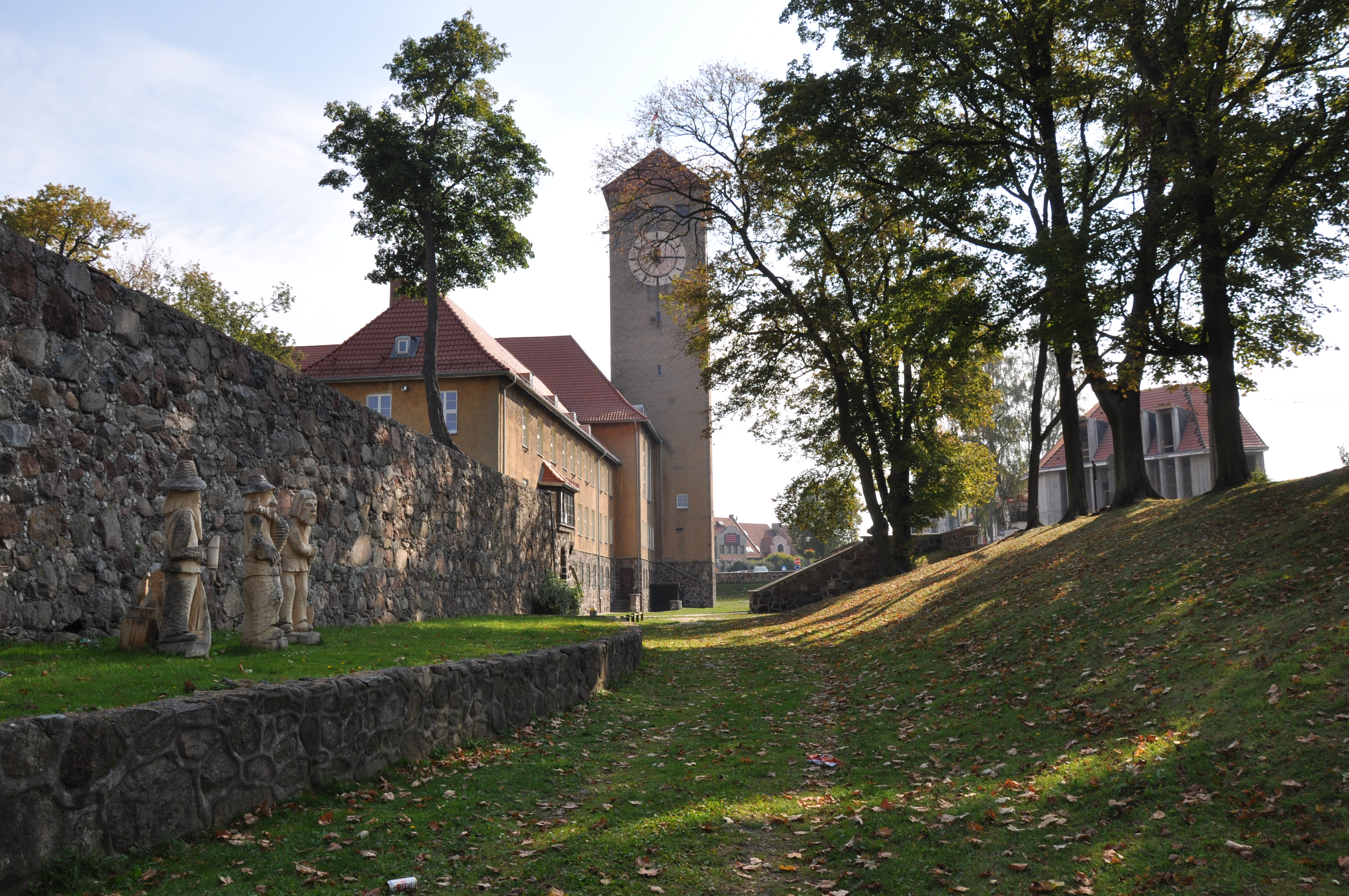 Szczytno, ratusz, 1937